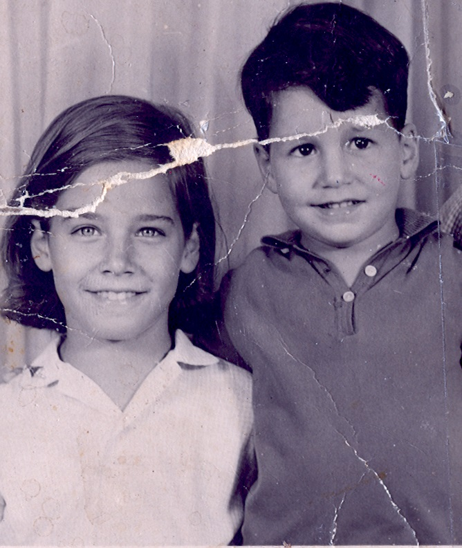 מתוך הסרט "האח שלי" של יולי כהן